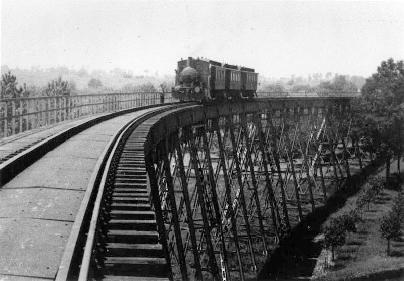 Viaduct van de Stoomtramlijn Maastricht-Vaals nabij de forellenkwekerij in Gulpen. Fotocollectie RHCL Maastricht, GAM 33500.